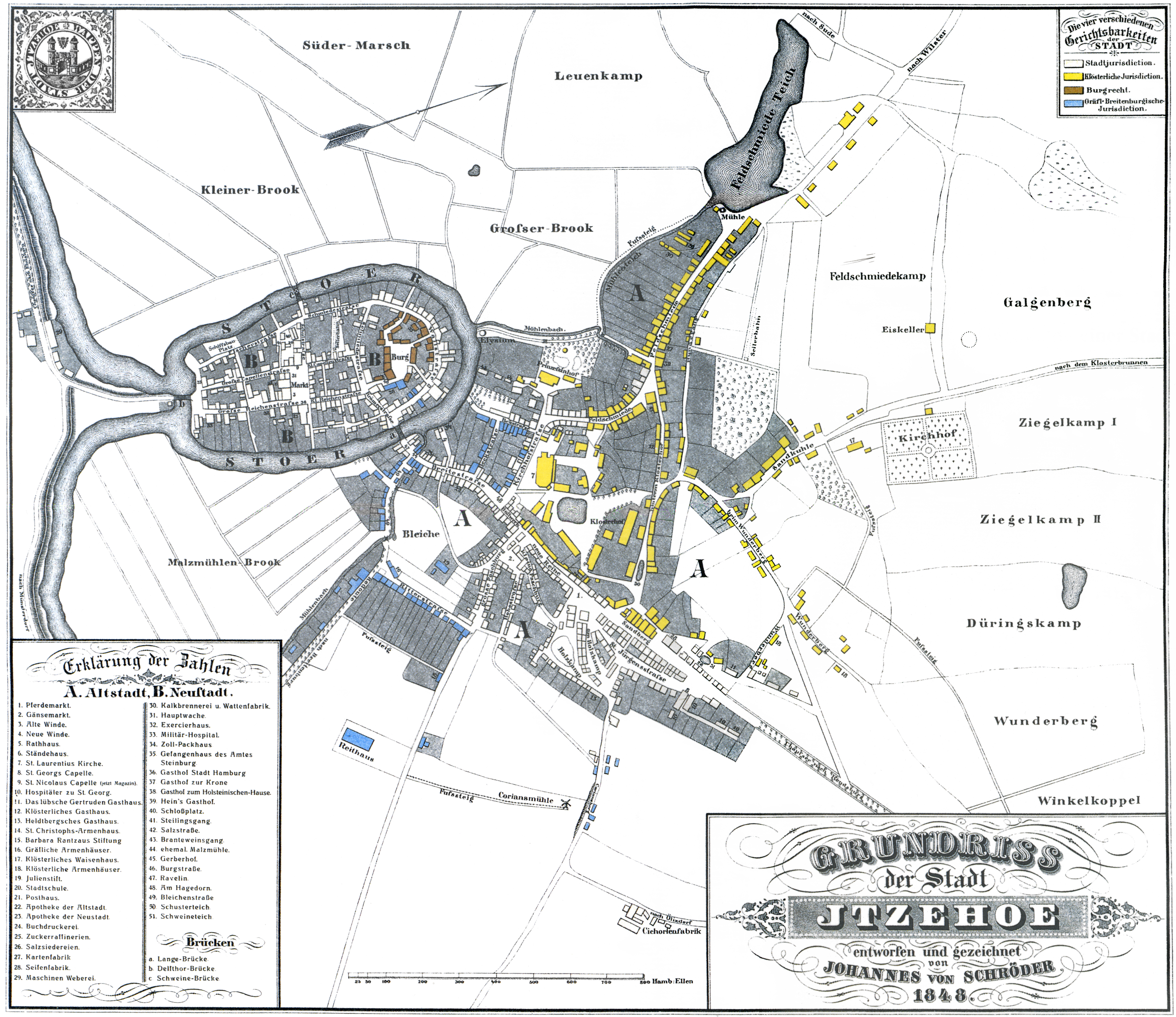 Die vier verschiedenen Gerichtsbarkeiten der Stadt Itzehoe